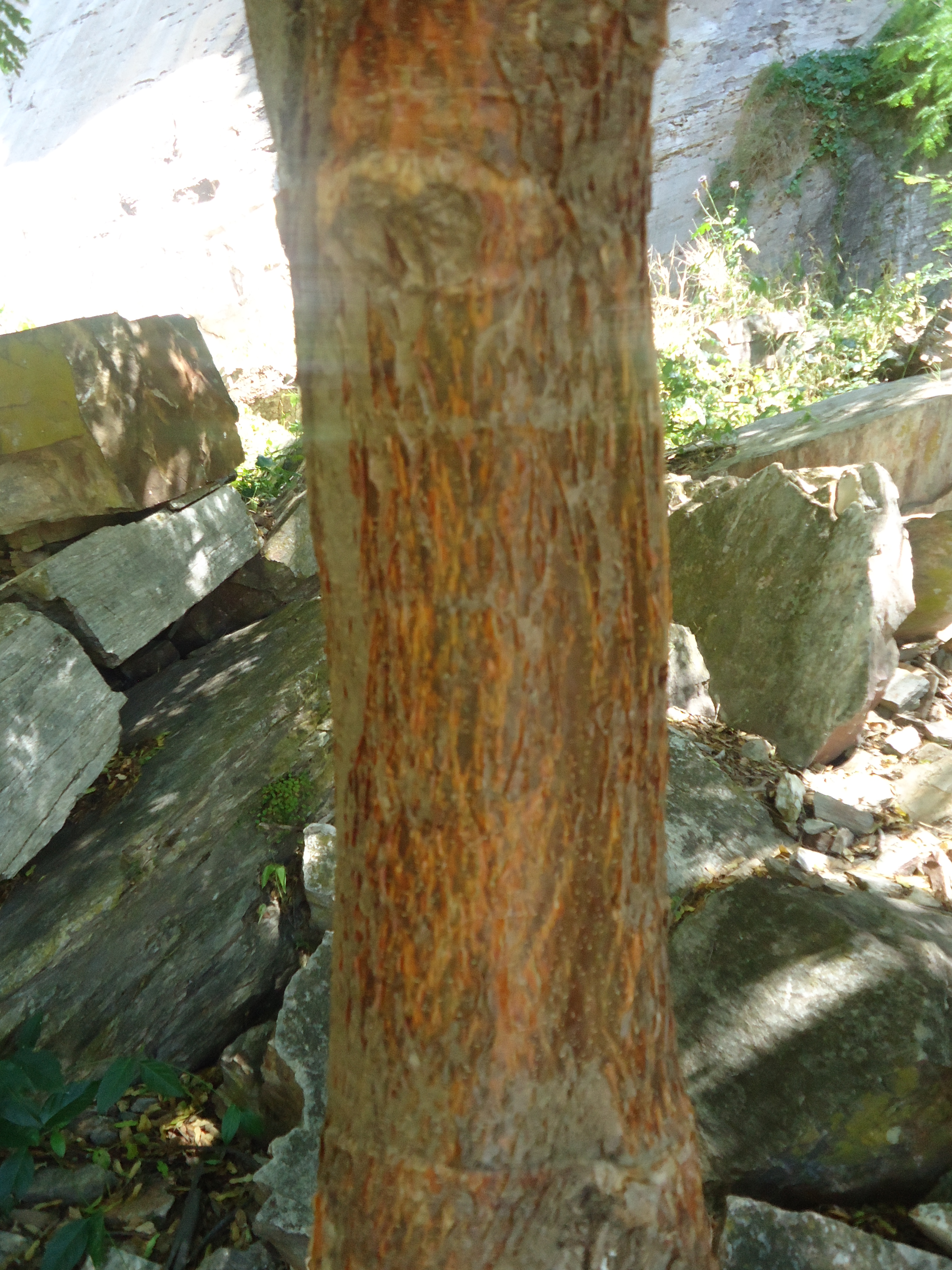 Casca do cumaru-nordestino, odorífera e marrom-avermelhada, que se desprende em ritidomas